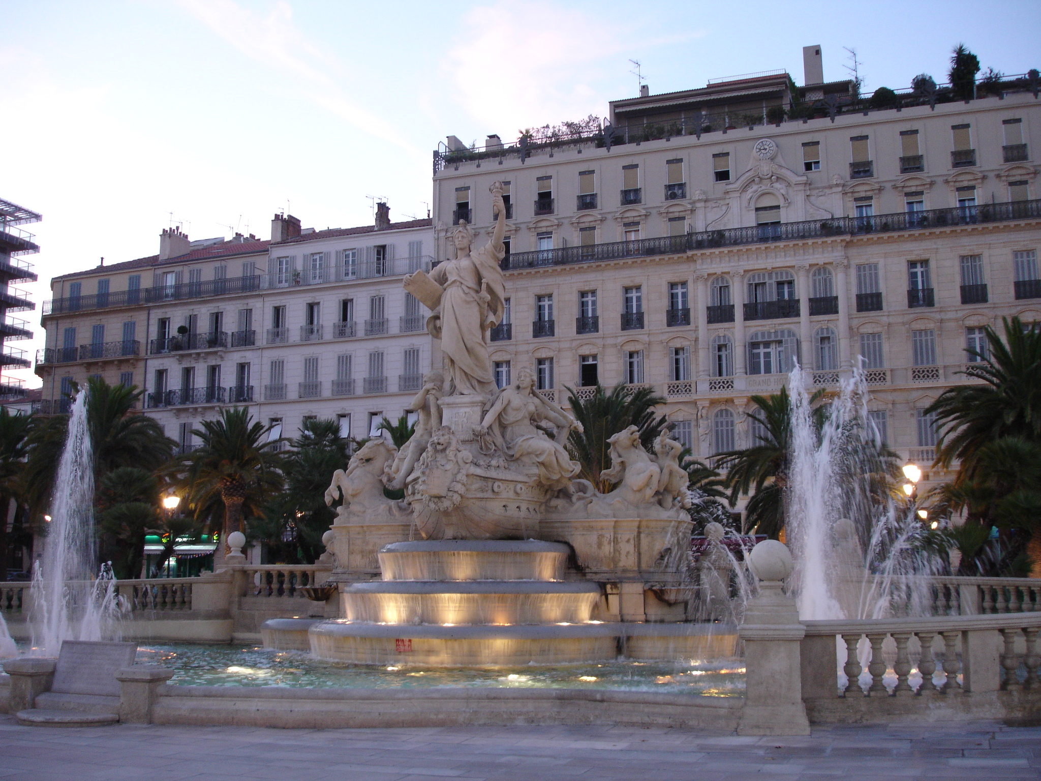 France, Var (83), Toulon, Place de la liberté